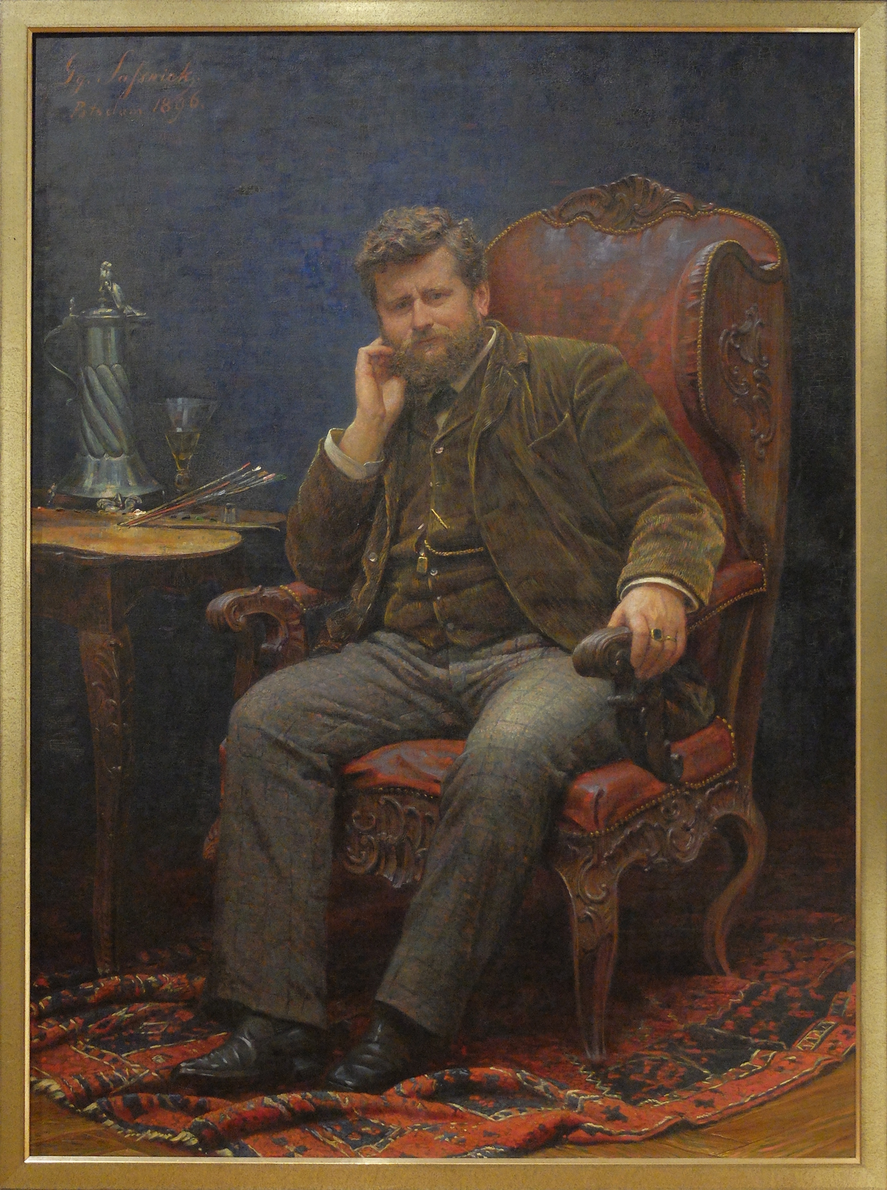 Fritz Rumpf gemalt von Georg Sassnick in Öl auf Leinwand im Jahr 1896 in Potsdam. Das Gemälde hängt im Potsdam Museum. Das Foto wurde gedreht und beschnitten, sodass nur noch Rahmen und Gemälde zu sehen sind.